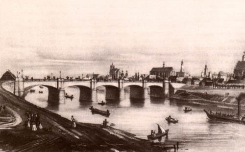 Most Podgórski ok. 1850, litografia Franza J. Sandmanna